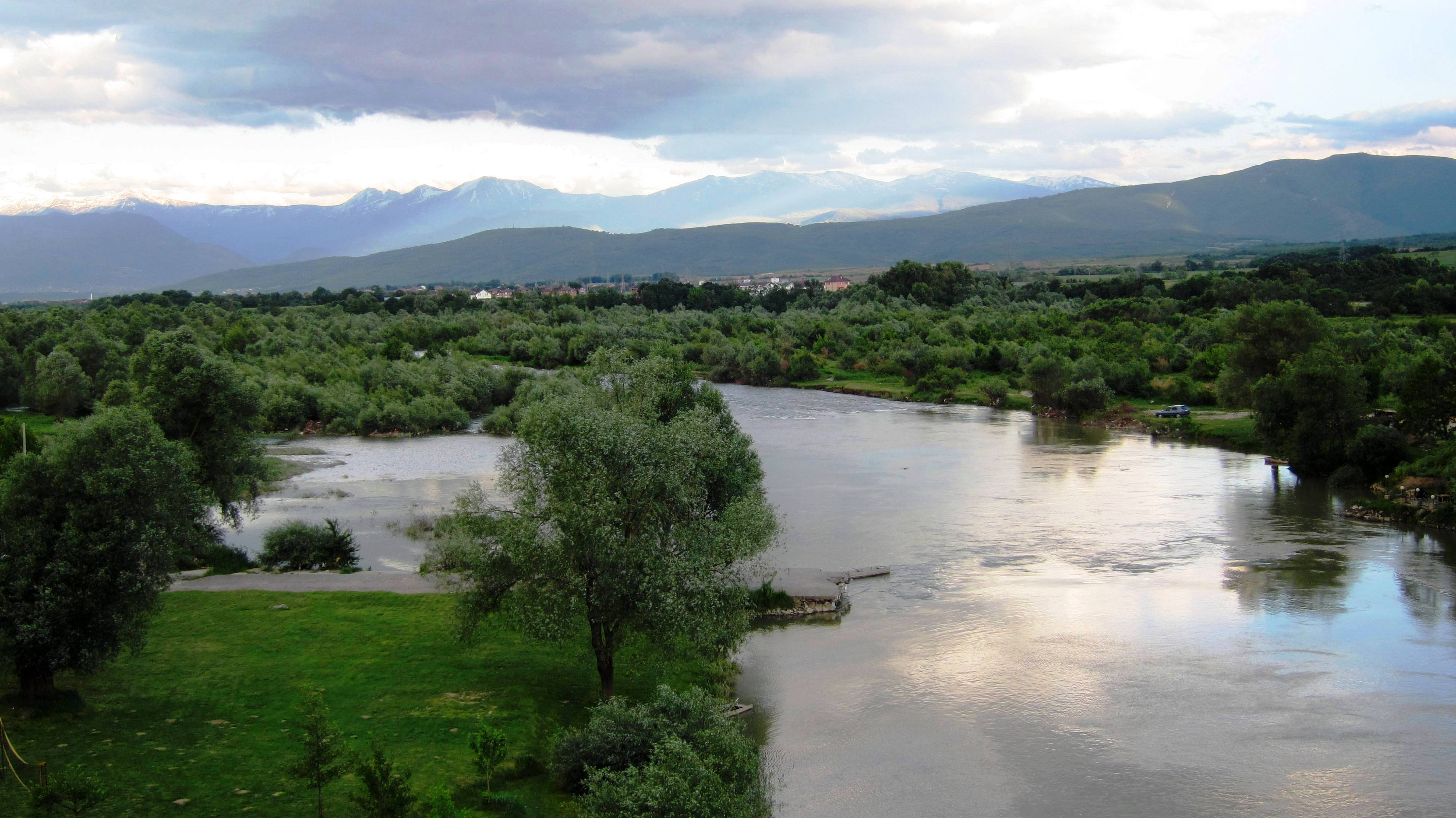 Drini i Bardhë (Weißer Drin), Kosovo